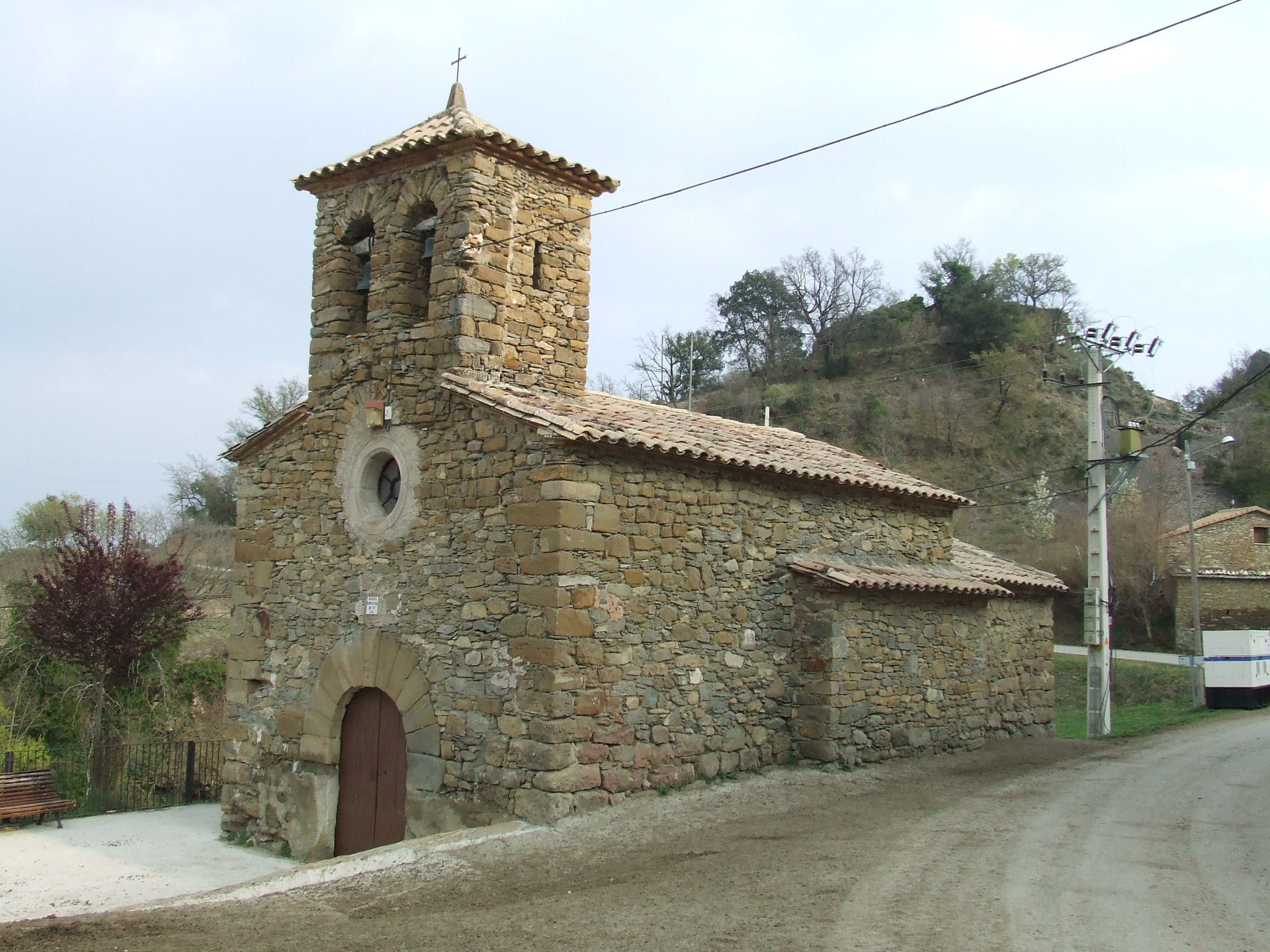 Santa Anna de Puigverd (Fígols de Tremp, Tremp, Pallars Jussà)